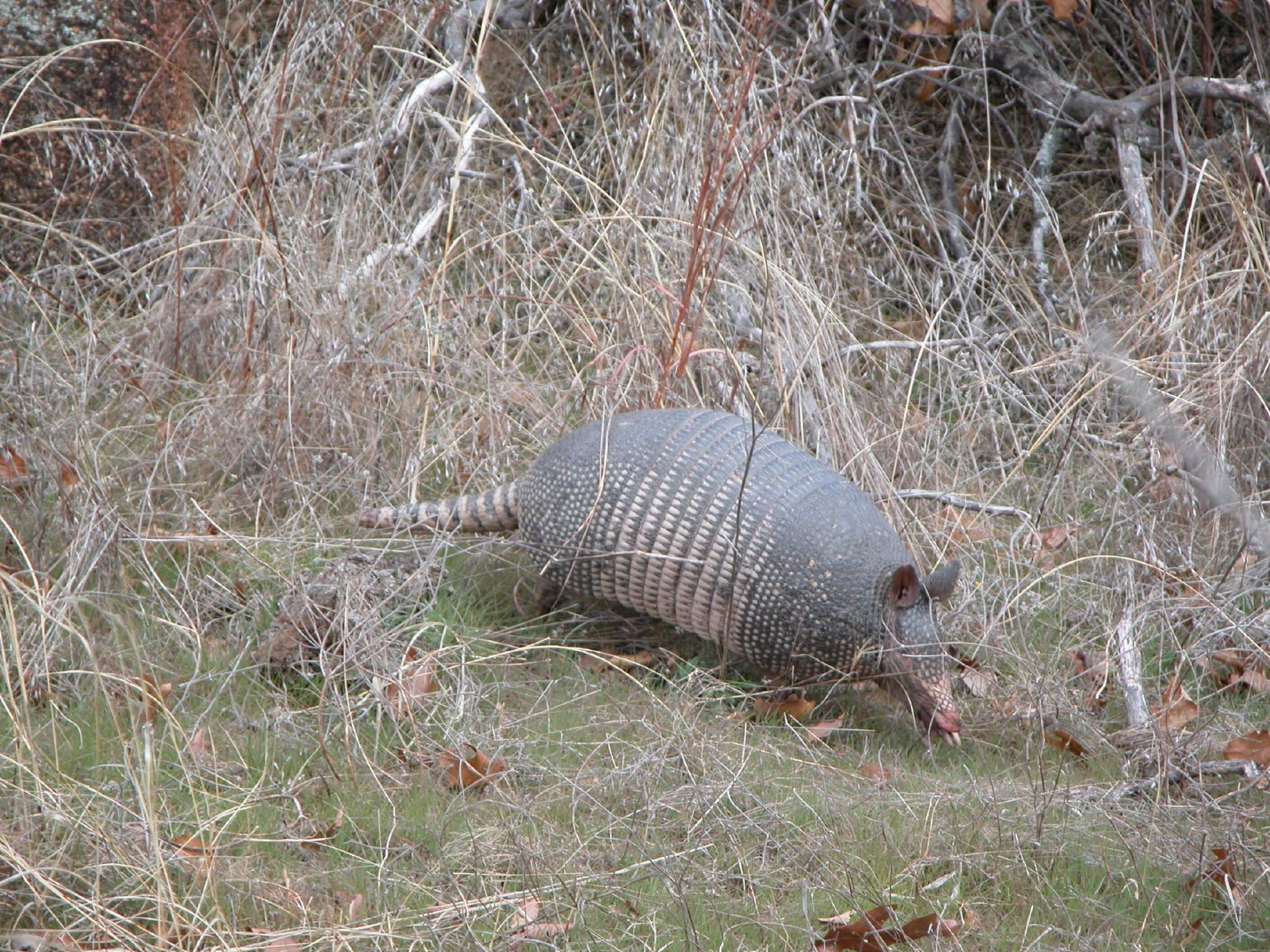 Armadillo from Oklahoma, USA